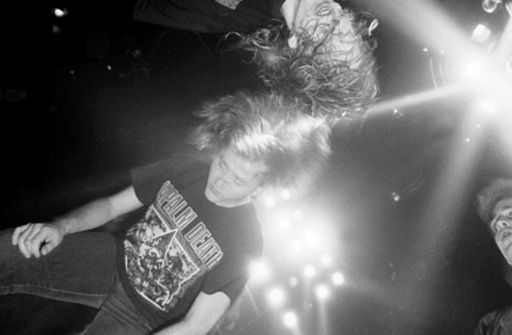 Heavy Metaller in der Disco Fantasy (1981-2001) in München-Neuaubing